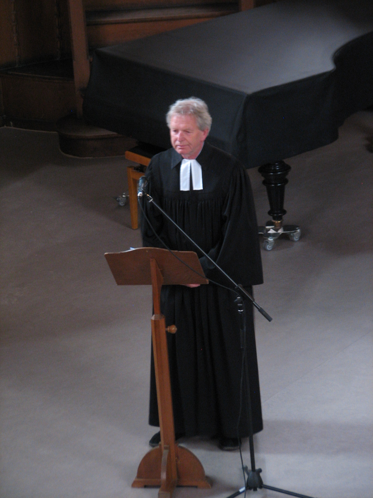 Altbischof Jochen Bohl, Wiedereröffnung der Philippus-Kirche Leipzig-Lindenau, 3. Mai 2019